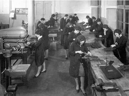 Esercitazione di aggiustaggio nell'istituto professionale femminile Elisabetta Sirani di Bologna negli anni del dopoguerra. Laboratorio avviato con la collaborazione dell'Istituto Aldini-Valeriani, che vi aveva destinato uno dei suoi insegnanti